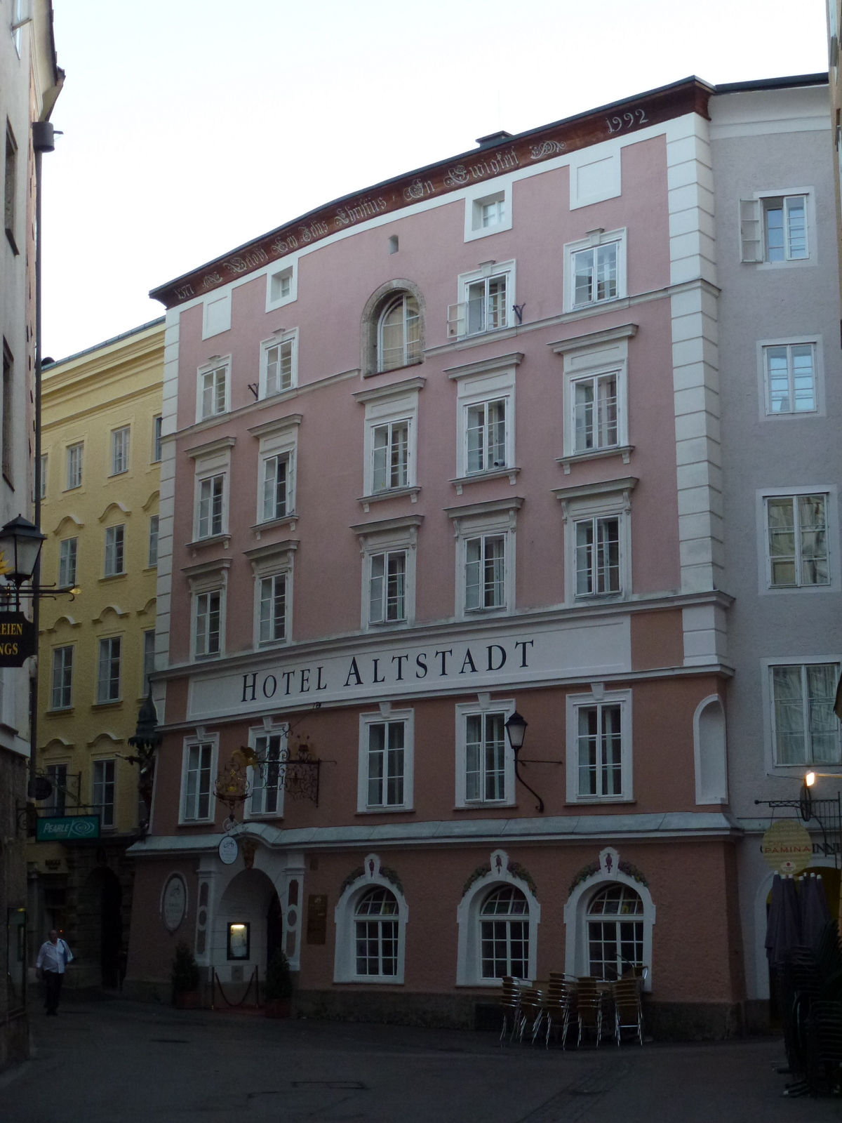 Judengasse Nr. 15 Laubingerhaus (Lawbingerhaus, 1423), später ab 1656 Höllbräu